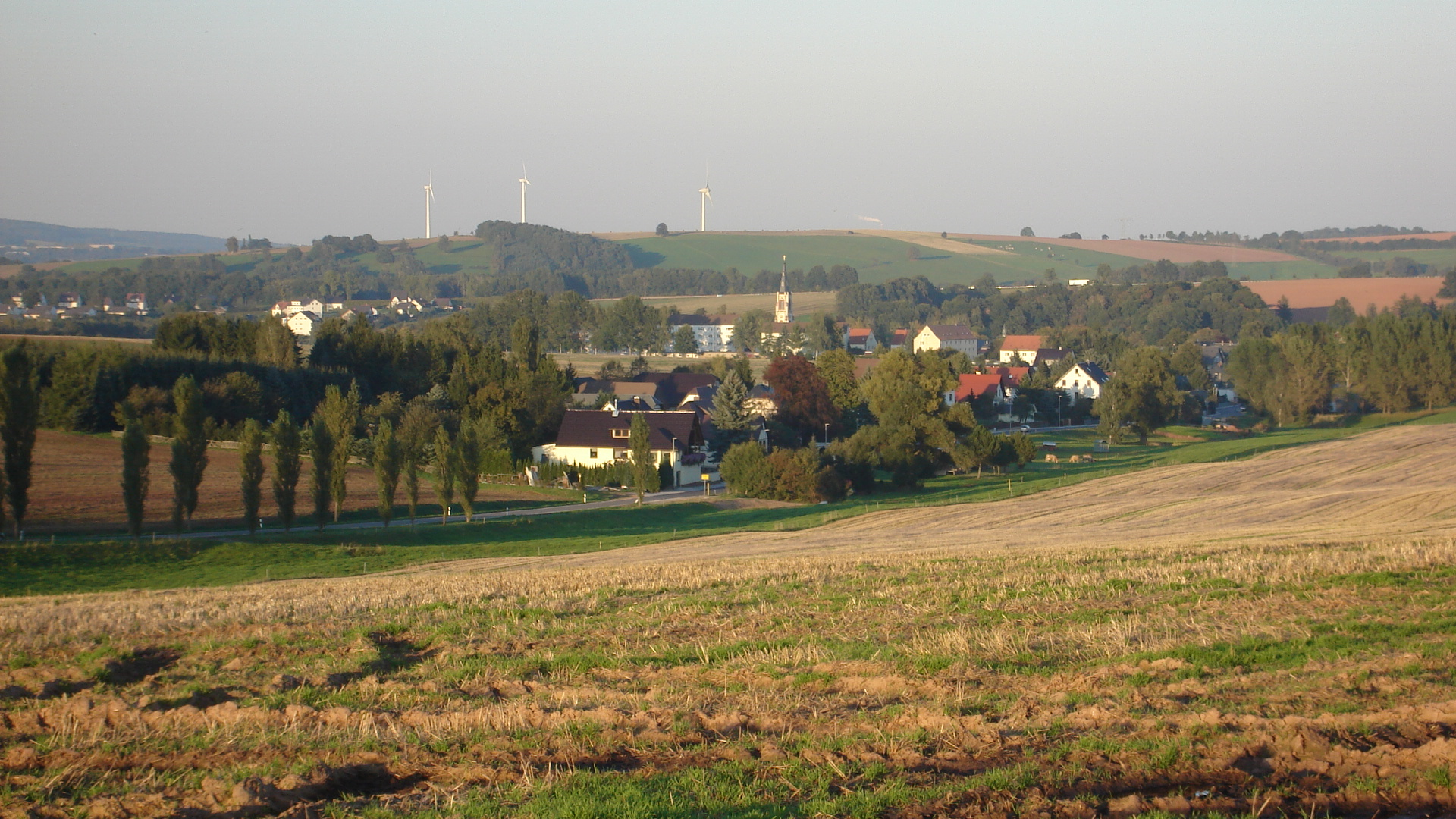 Gersdorf (Hofgraben)